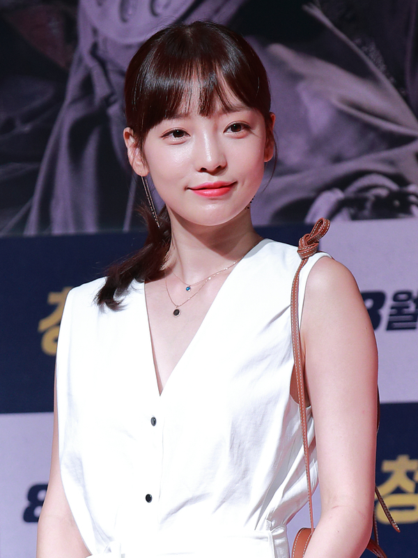 170807 청년경찰 VIP 시사회